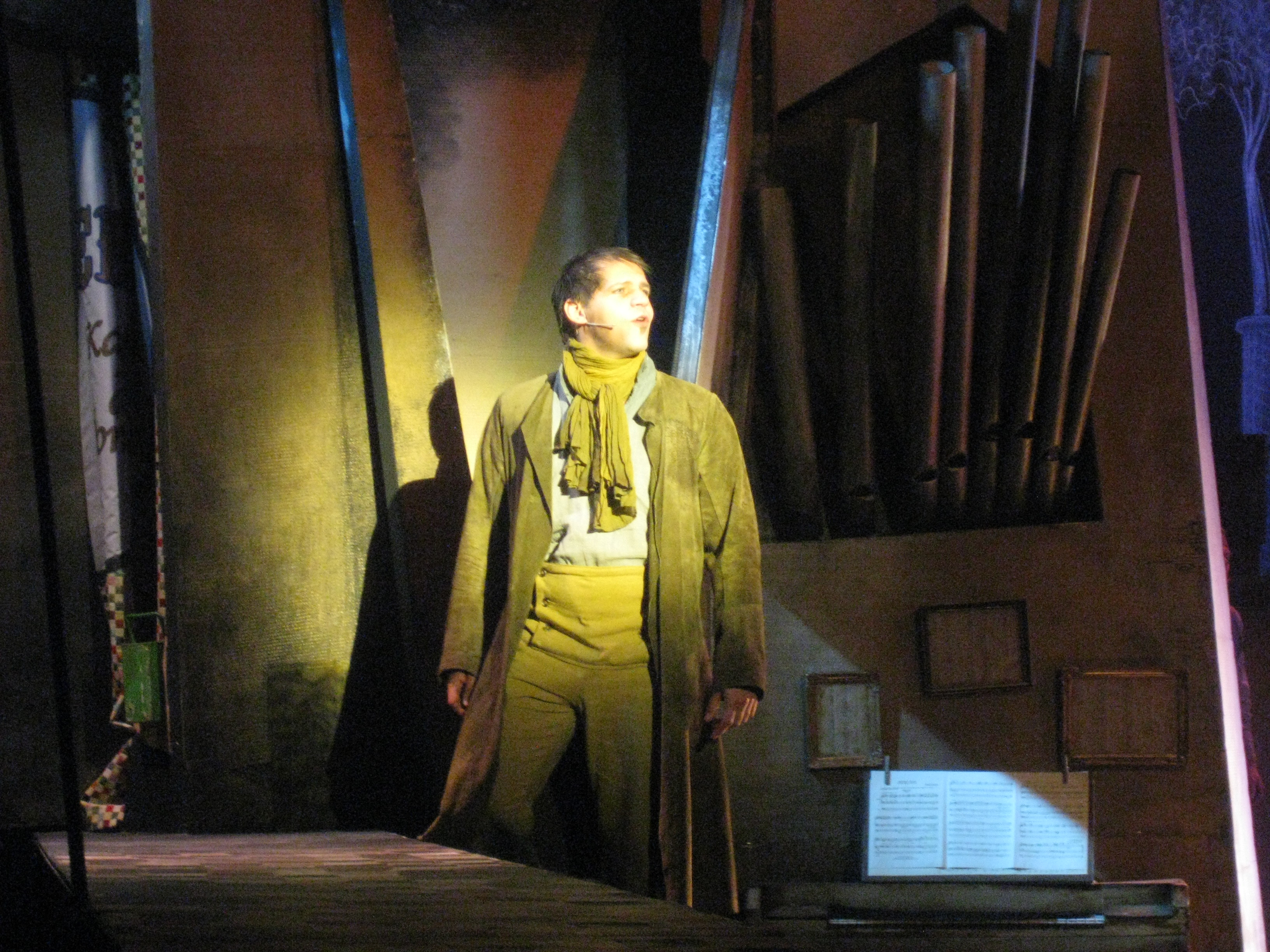 René van Kooten als Sweeney Todd in de musical Sweeney Todd in mei 2016 in het Zonnehuis in Amsterdam Noord